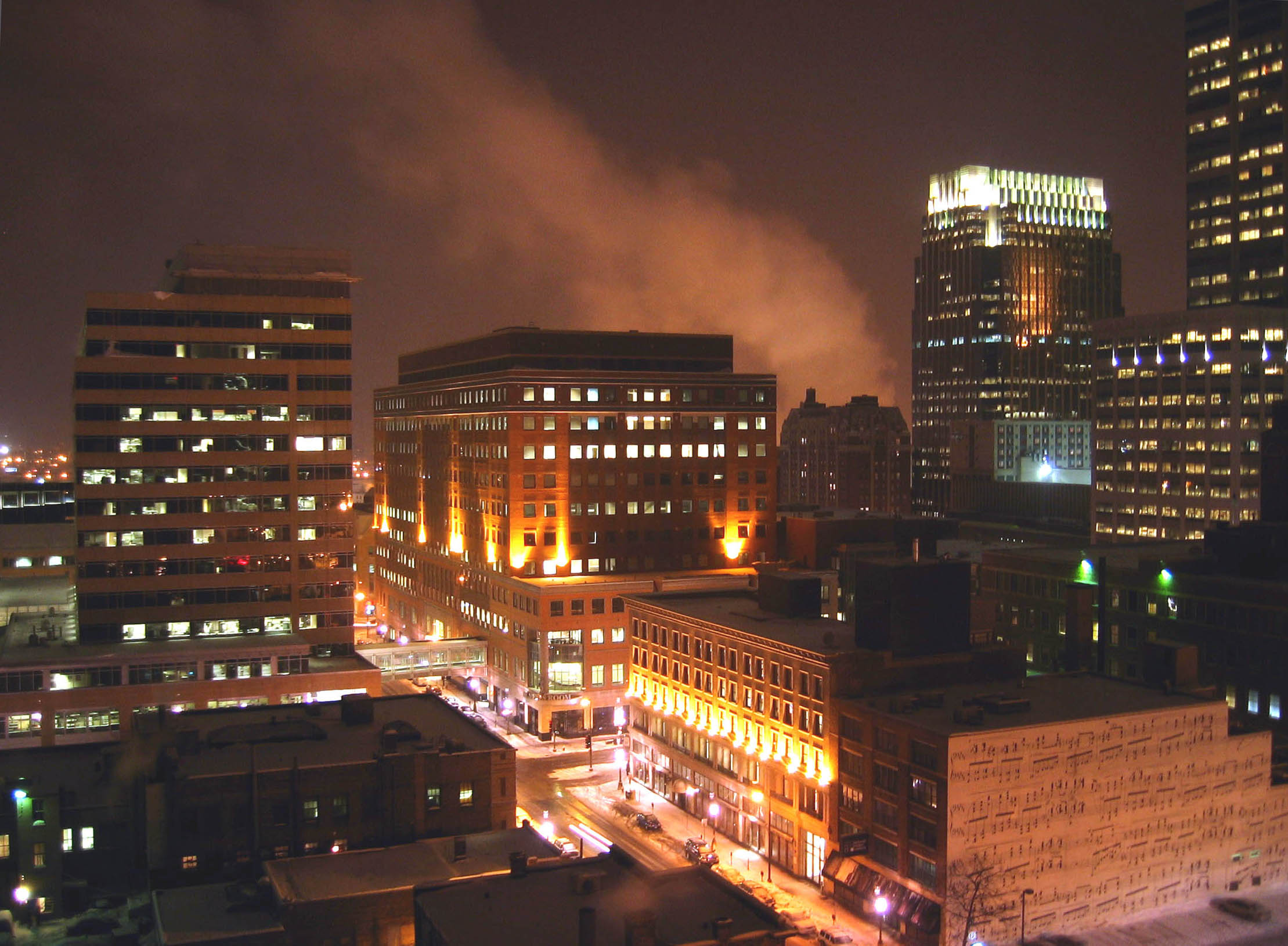 Minneapolis at nightMinneapolis